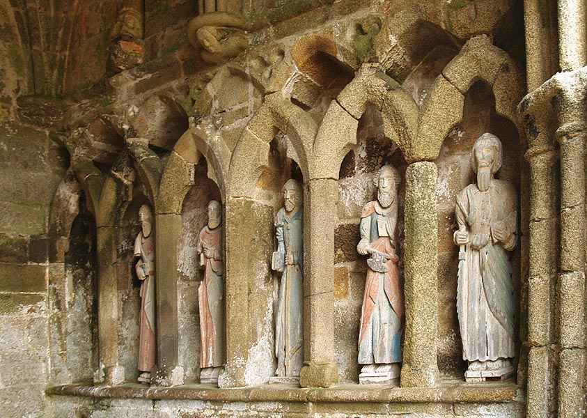 Chapelle Kermaria an Iskuit, commune de Plouha, Côtes-d'Armor (22), France. Porche, interieur est.